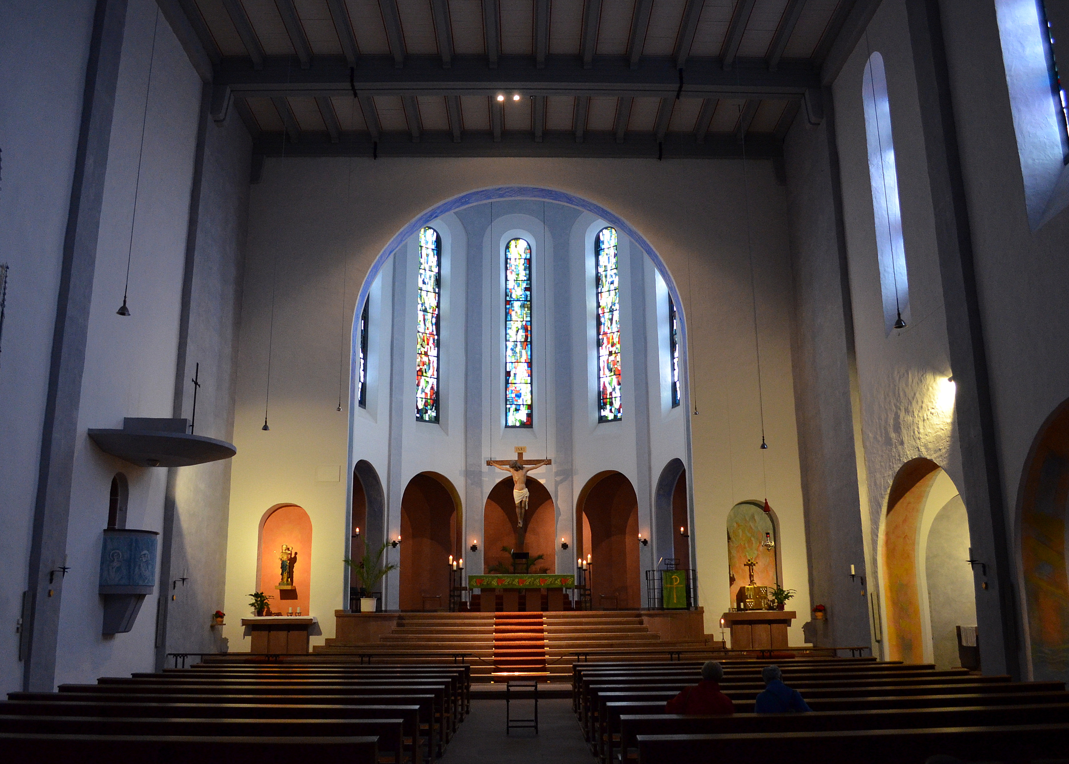 Interieur